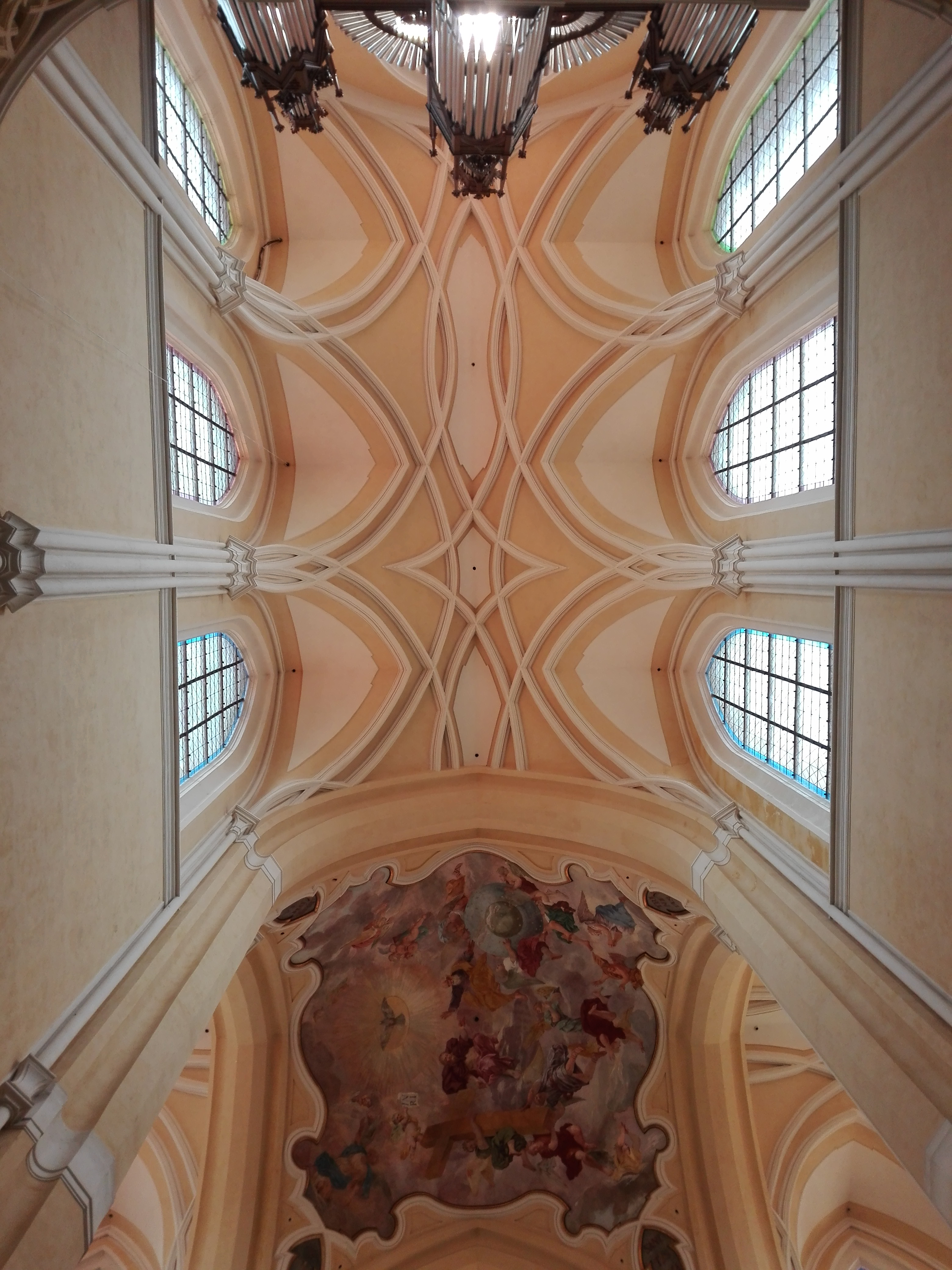 Interiér kostela - klenby, Sedlec